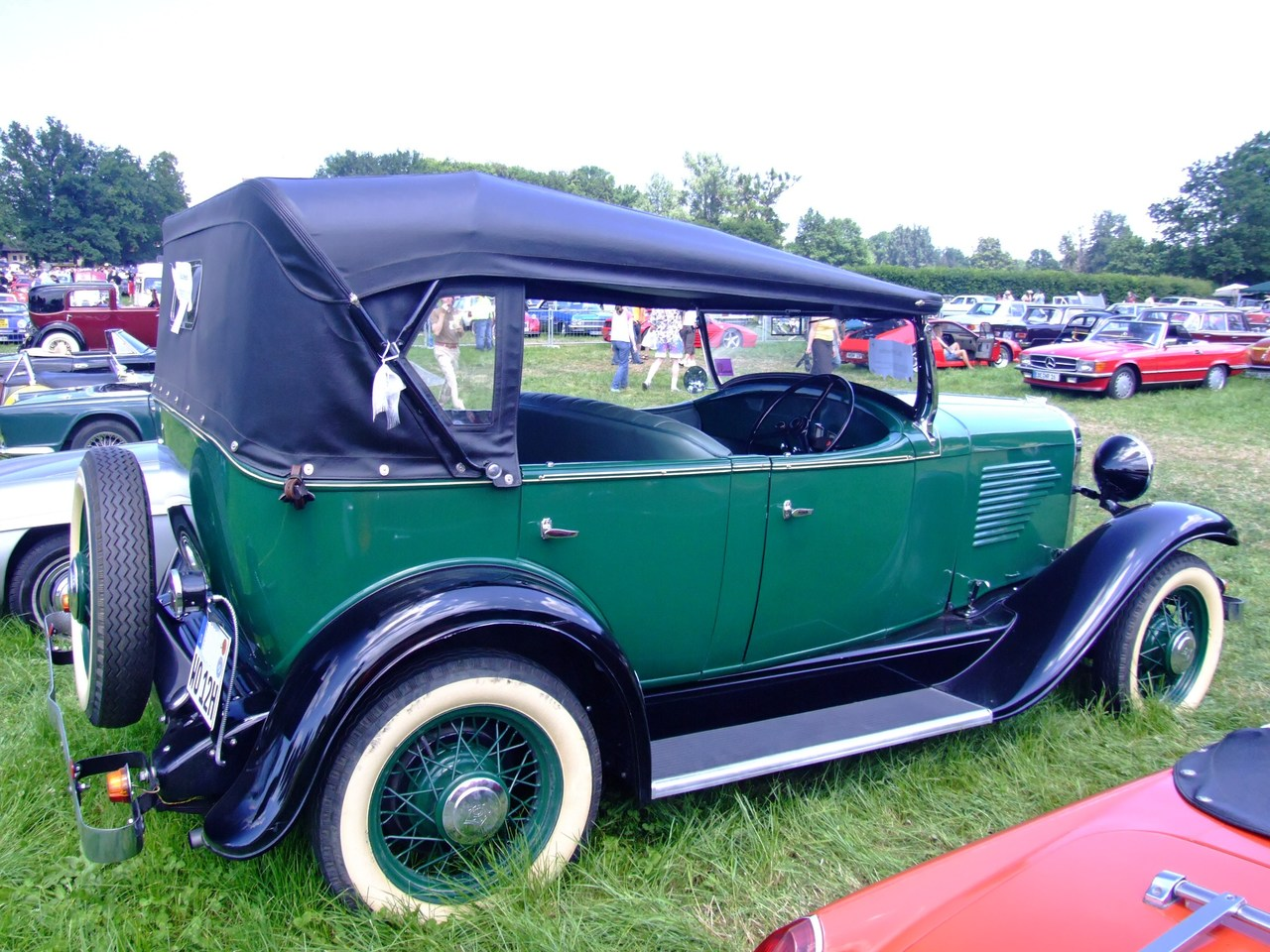 Quelle: selbst fotografiert, 06/2007 Fotograf: Späth Chr.